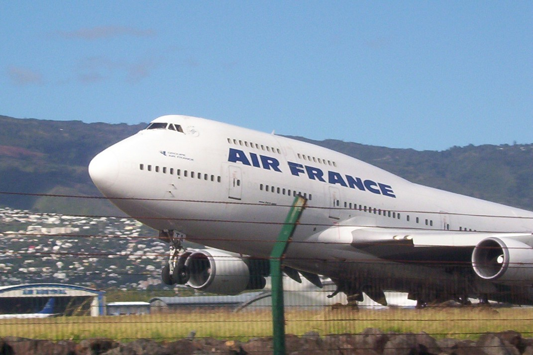 Photo d'un avion d'Air France prise à Gillot (RUN) Photo perso, licence libre